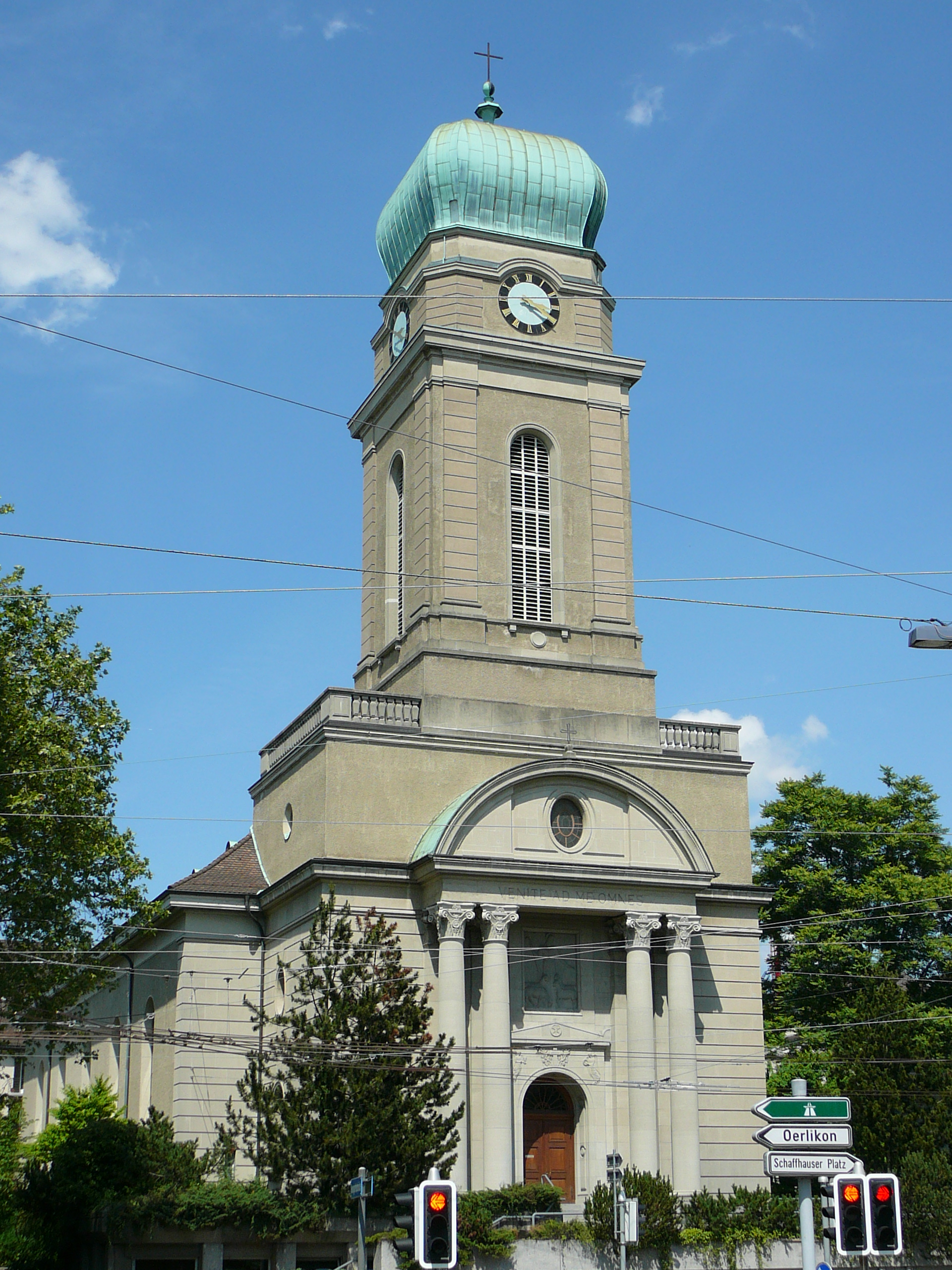 römisch-katholische Kirche Guthirt Zürich-Wipkingen, Aussenfassade